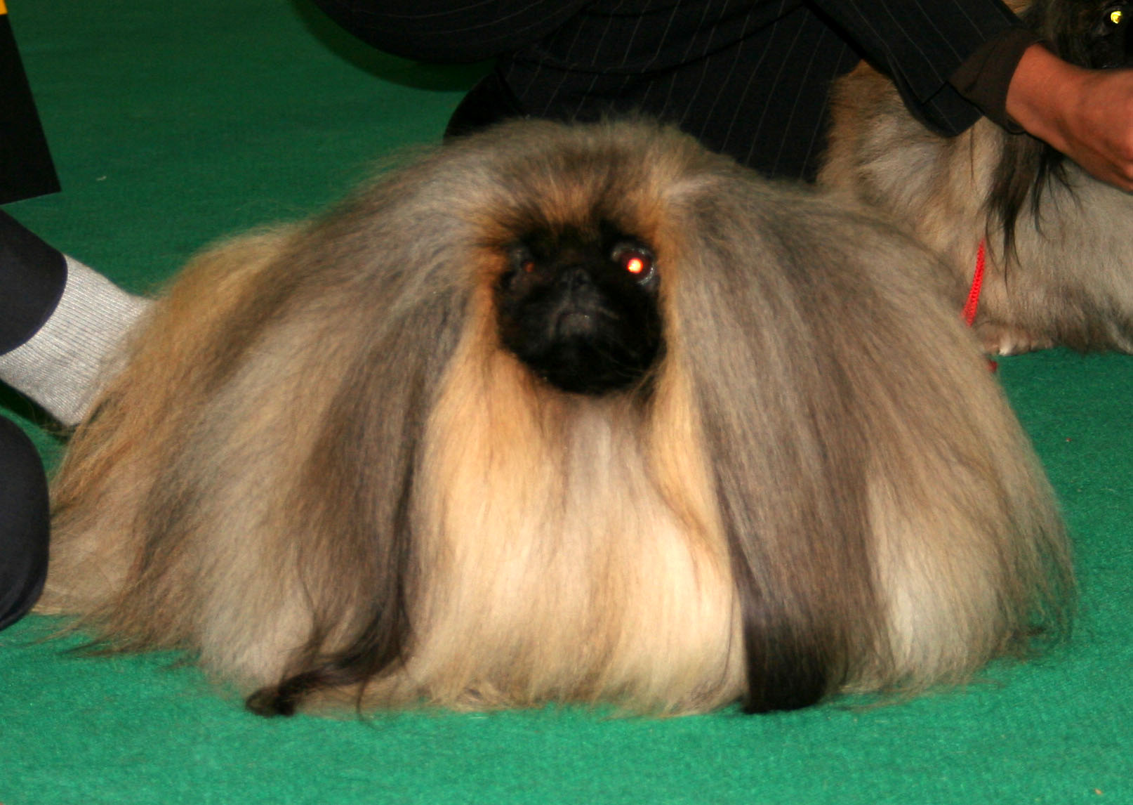 Pekińczyk na Światowej Wystawie Psów Rasowych w Poznaniu